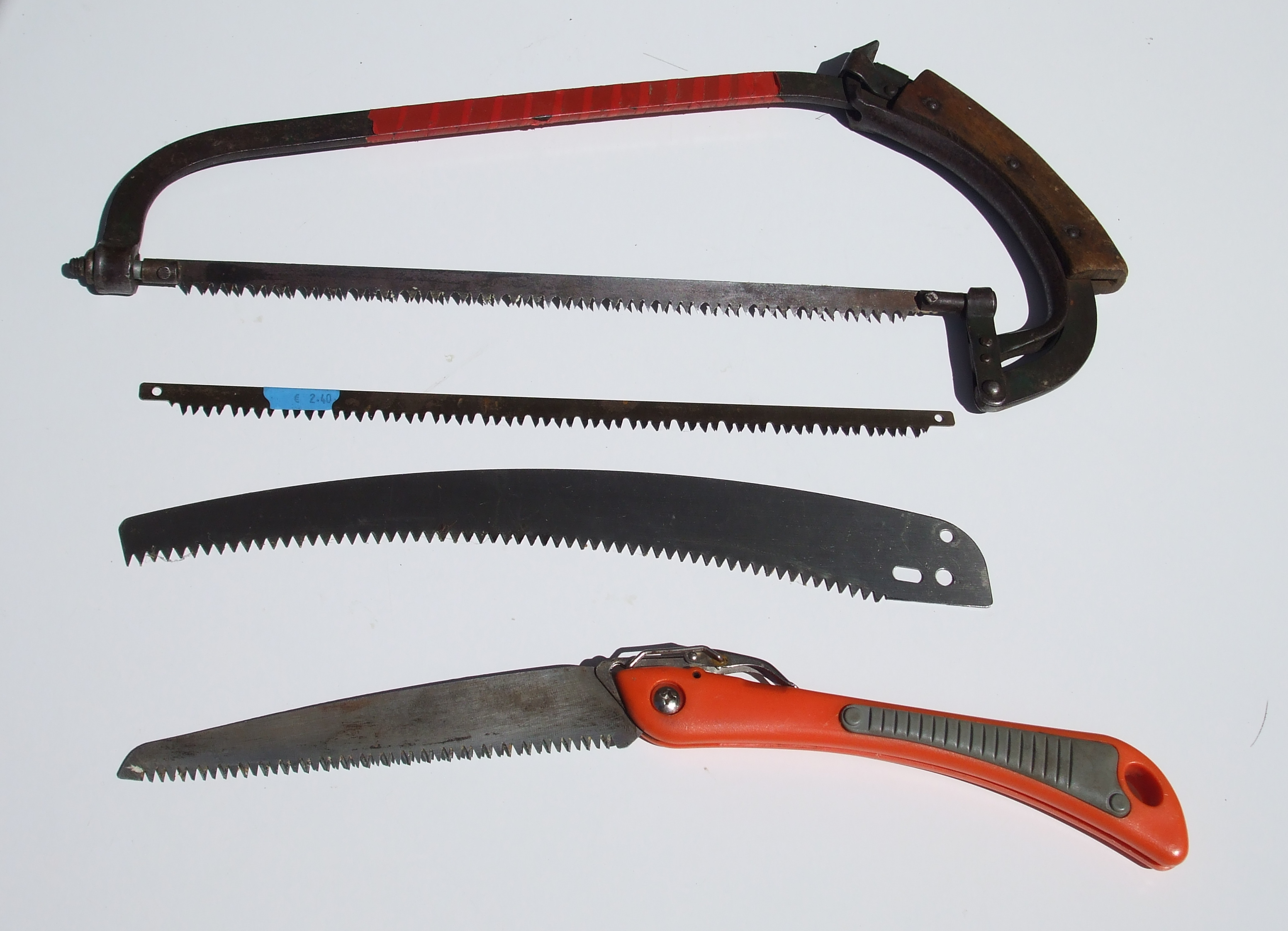 Astsäge & verschiedene Sägeblätter im Vergleich. Astsäge komplett, darunter Ersatzsägeblatt, Sägeblatt von einer Teleskopstangensäge, (japanische?) Klappsäge arbeitet auf Zug.